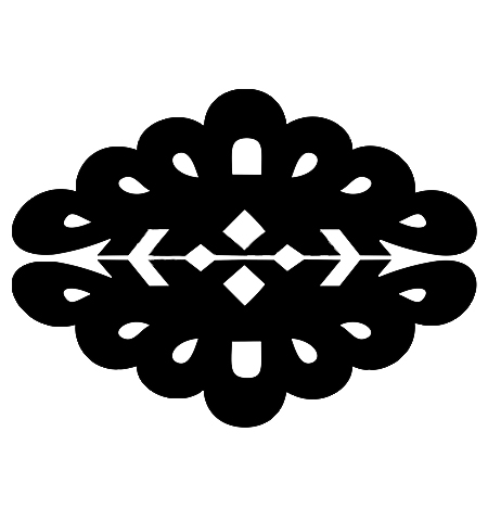 細川京兆家 家紋